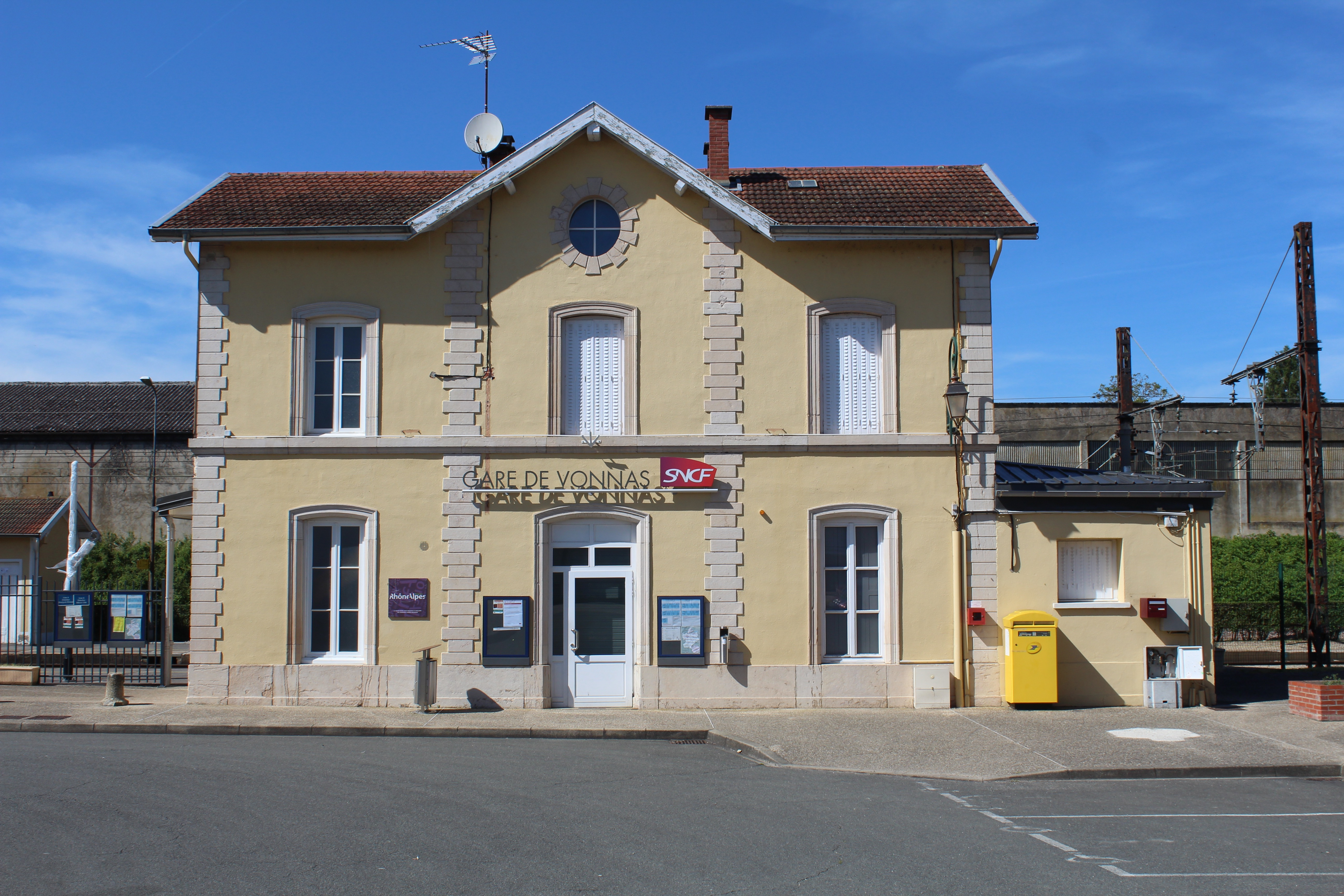 Vue sur la gare ferroviaire de Vonnas.